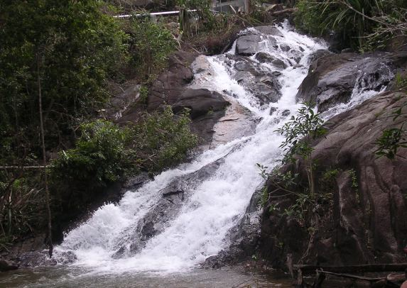 Potensi sungai untuk mikrohidro